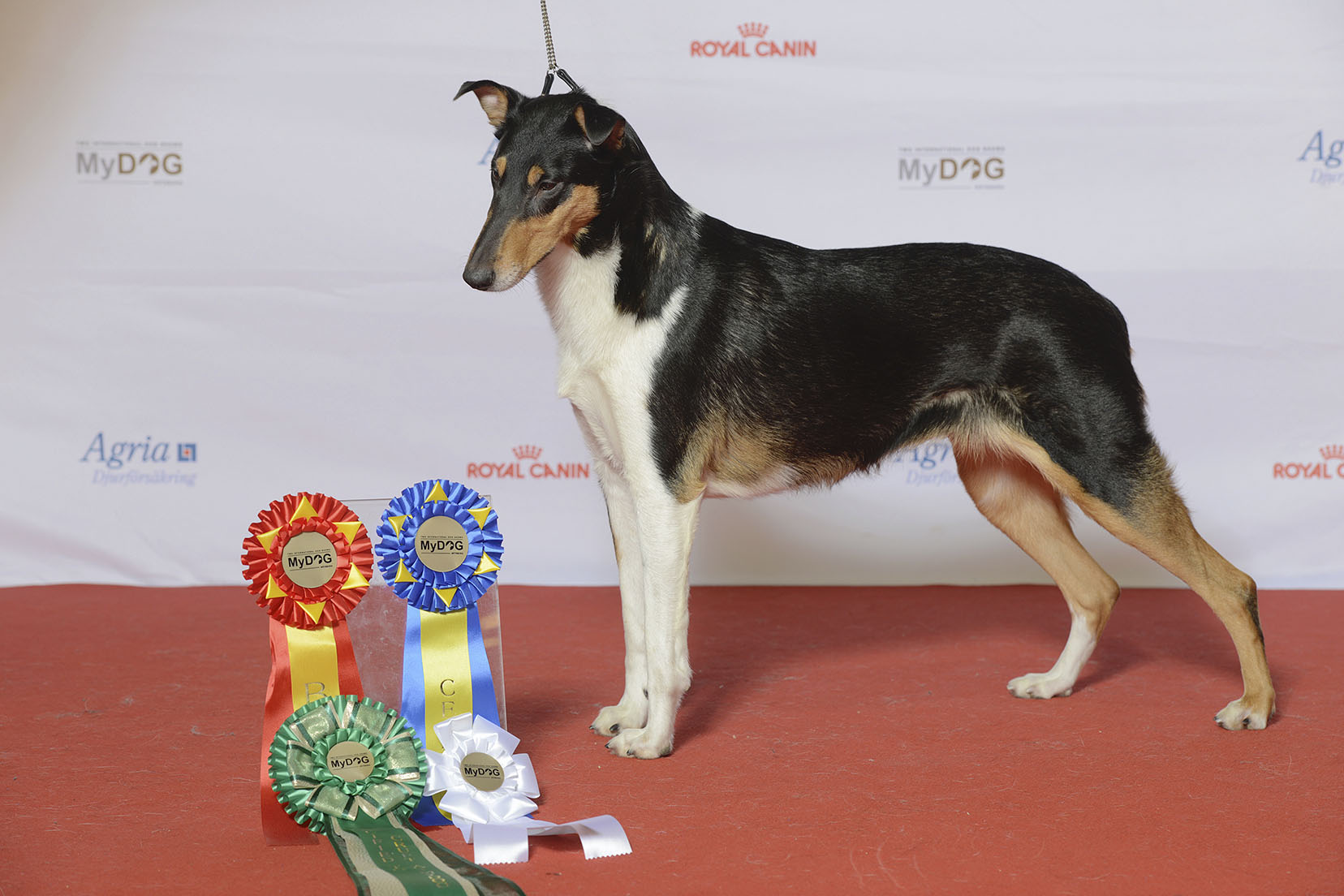 Grupp 1, COLLIE, KORTHÅRIG, Törnskogens Euphoria MyDOG, nordens största hundevenemang.